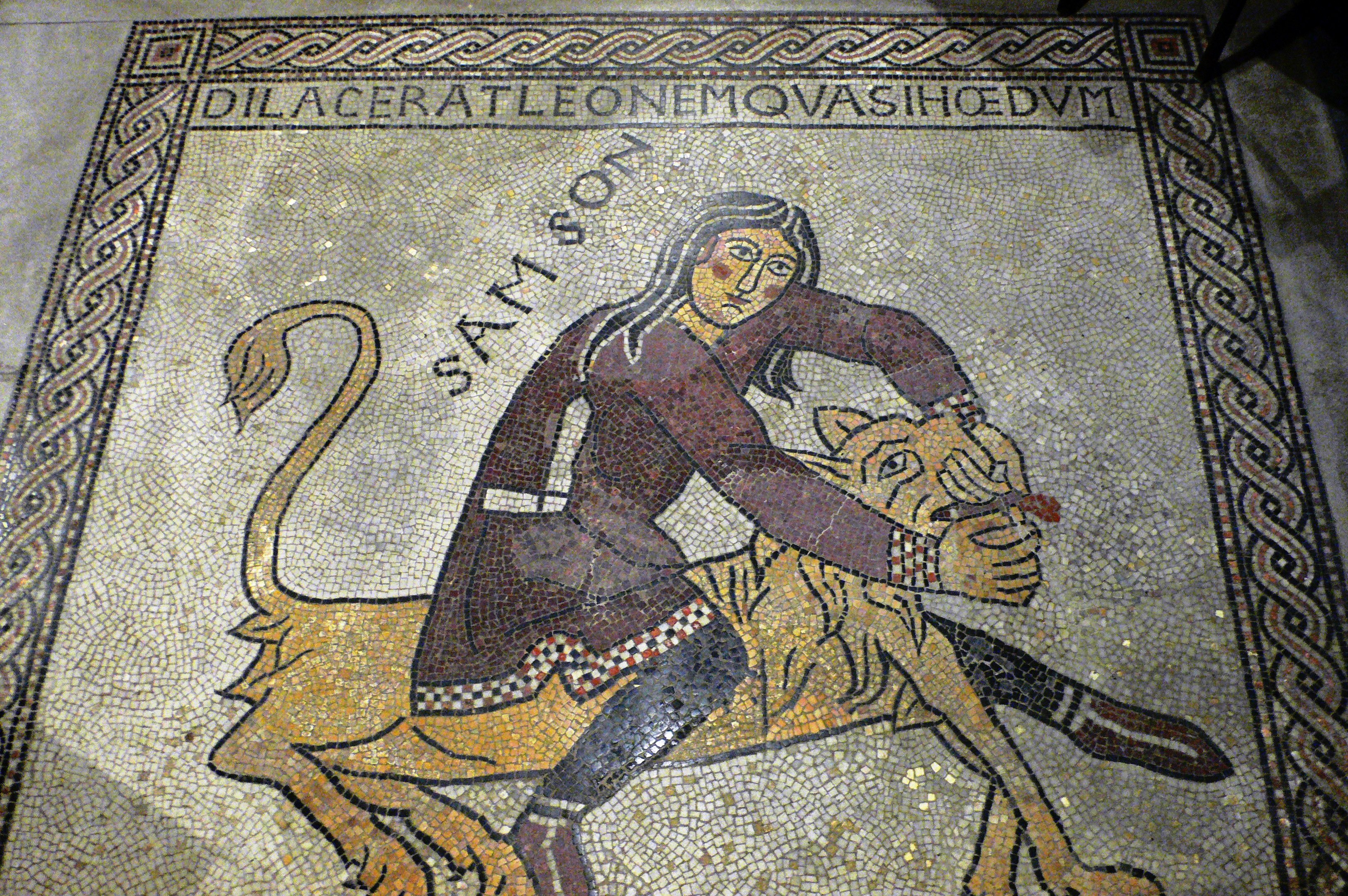 Fußbodenmosaik der Krypta: Samson bezwingt den Löwen